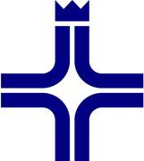 Deutsches Militärordinariat (röm.-kath.) — Emblem ohne Inschrift